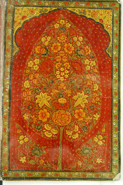 11 Lined Qur'an قرآن خطی11 سطری شماره، کاتب به نحوی صفحات قرآن را تحریر کرده که در تمام صفحات حرف اول از سطر اول با حرف اول از سطر آخر مطابقت دارد و به همین ترتیب از سطرهای دوم تا پنجم با حرف اول از سطرهای هفتم تا دهم مطابق است و سطر ششم در تمام صفحات منفرد است